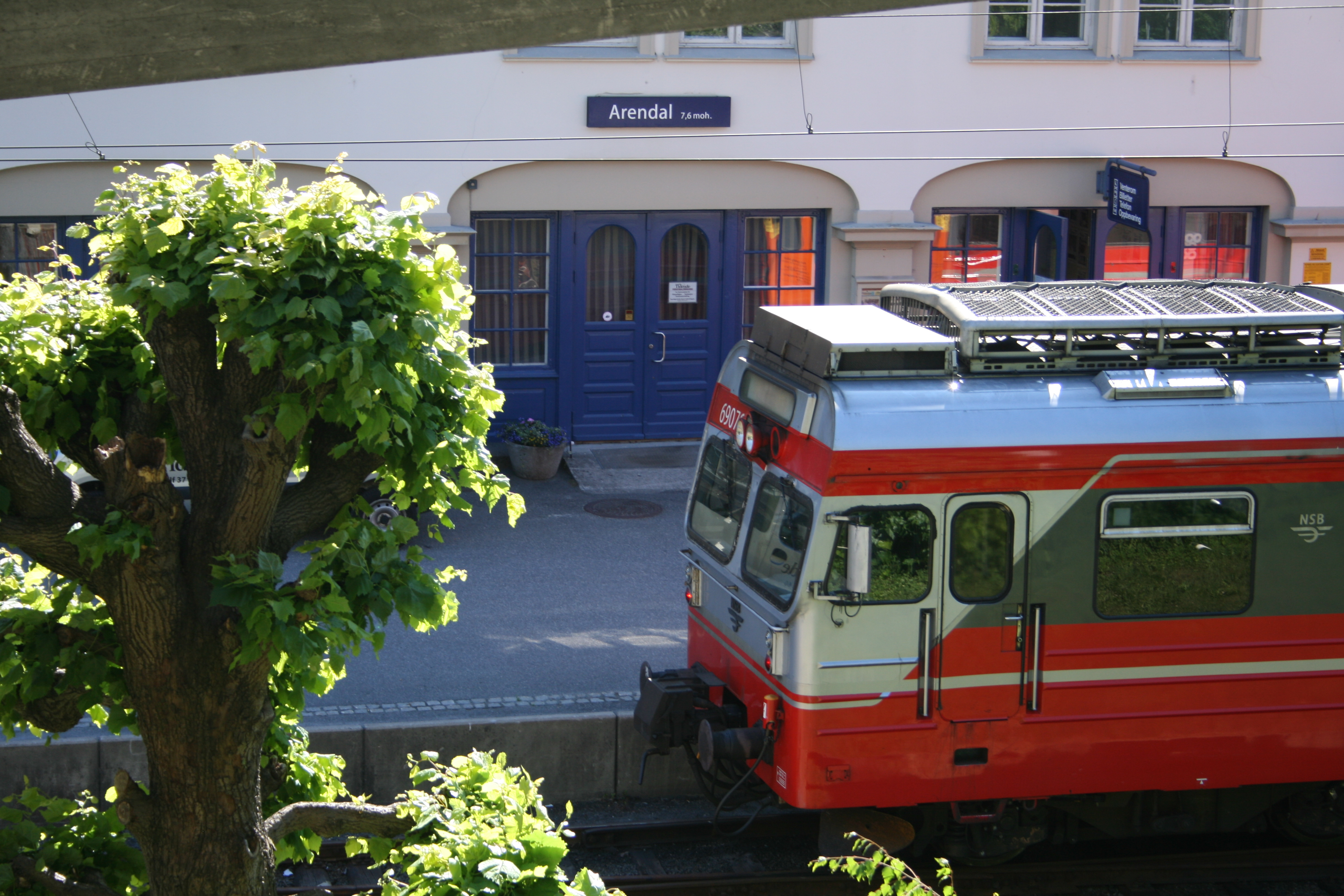 Arendal jernbanestasjon